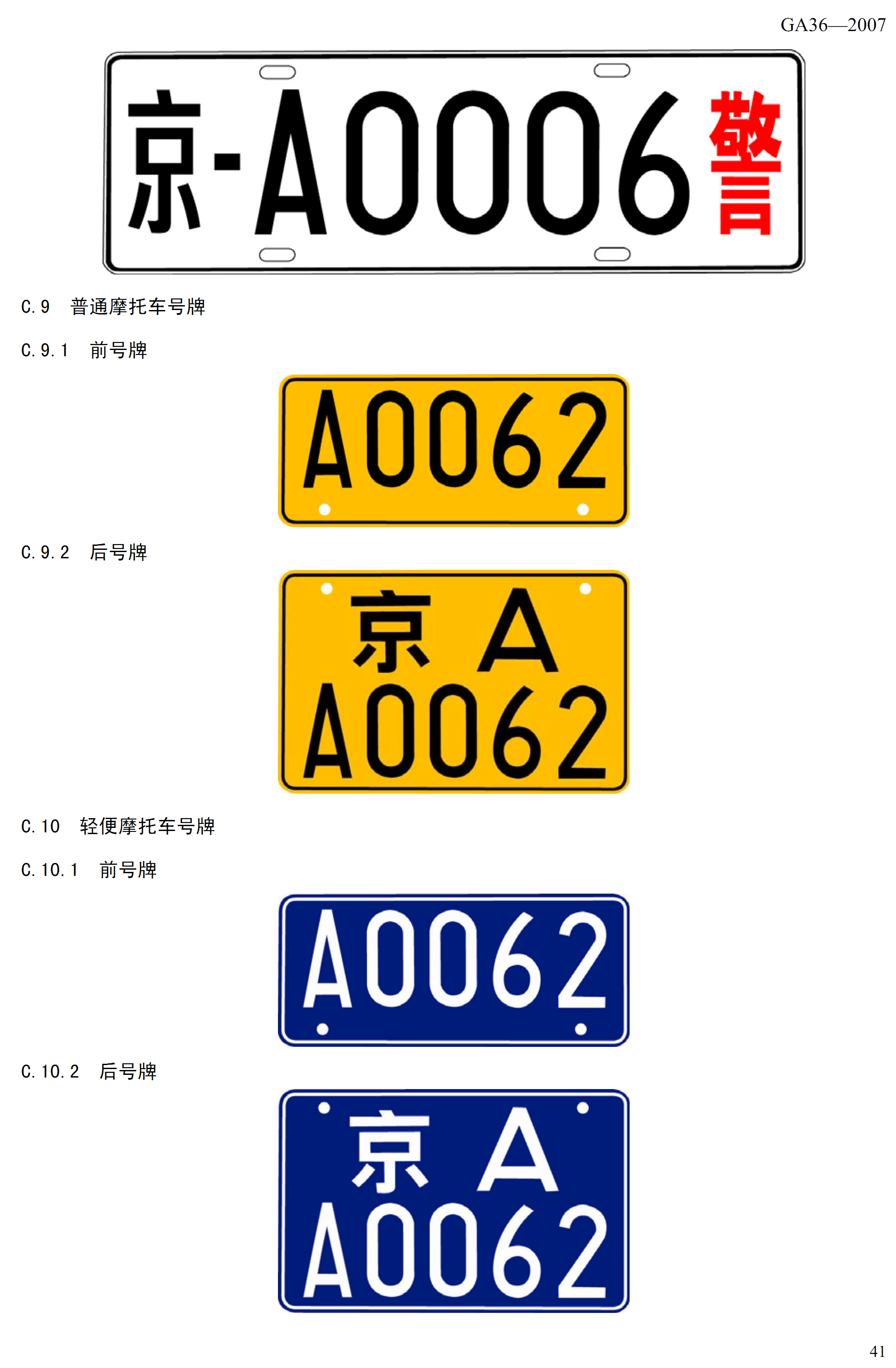 中文（中国大陆）: 中华人民共和国机动车号牌示意图4)